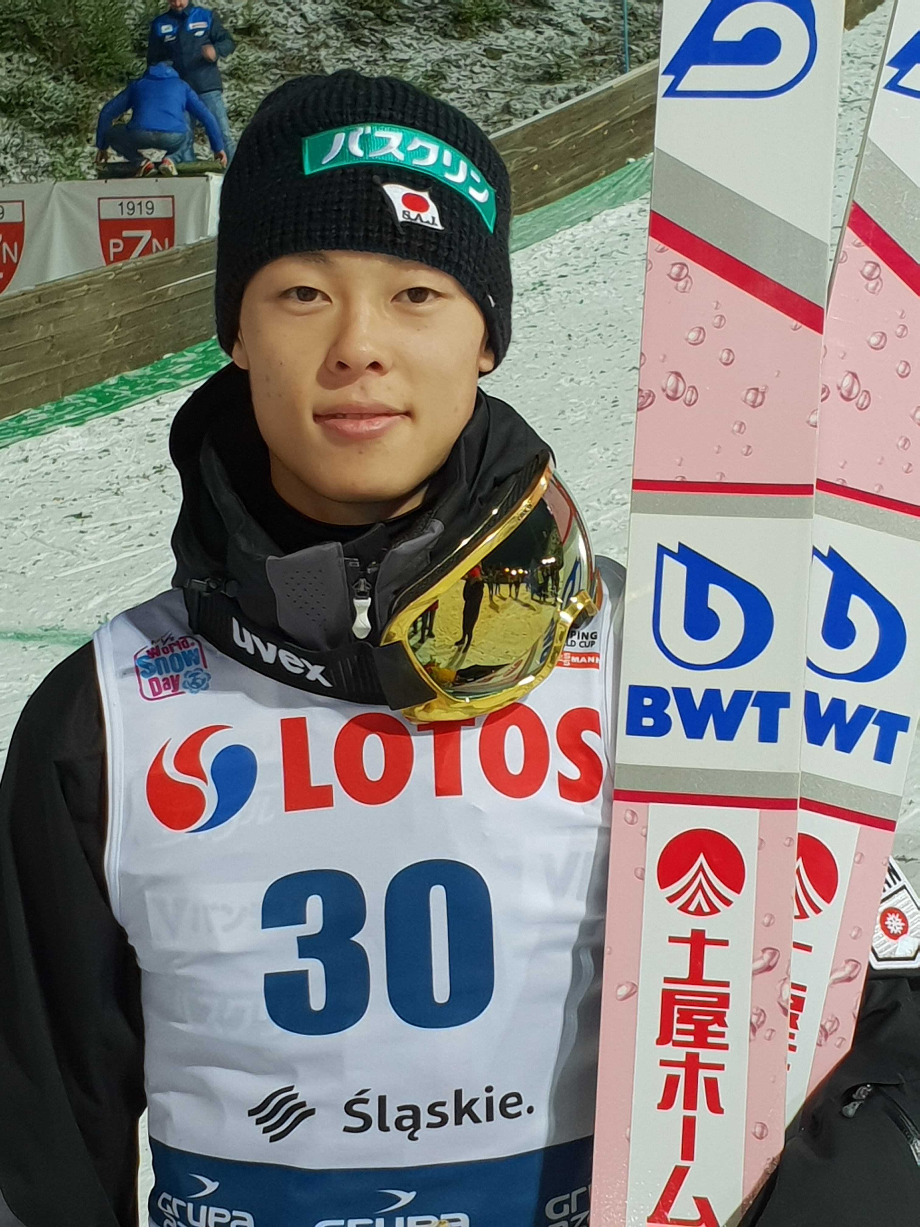 Ryoyu Kobayashi, japanischer Skispringer, nach dem Erreichen des 3. Platzes im Weltcup in Wisla/Polen